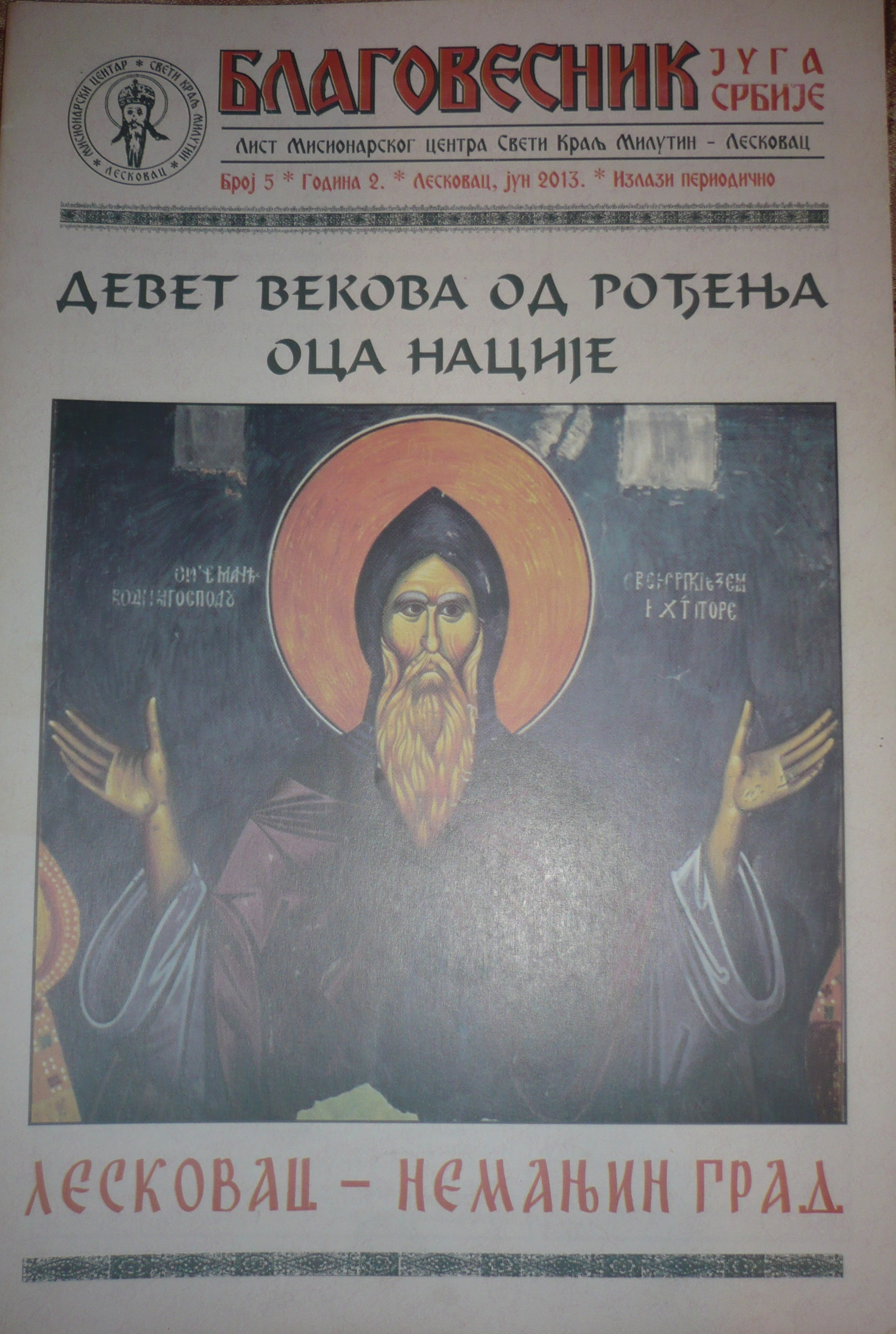 Српски (ћирилица): Image